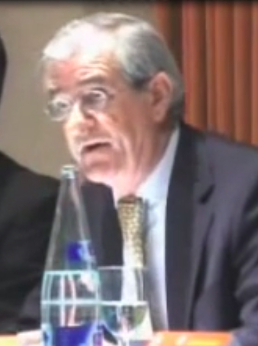 Inauguración del Seminario "Cómo hacer realidad la voluntad de renovación metodológica en la Universidad". Organizado por la Cátedra UNESCO de Gestión y Política Universitaria de la UPM y la Junta de Castilla y León, el 22 de mayo de 2007 en Segovia. Intervienen: Francisco Javier Álvarez Guisasola, consejero de Educación de la Junta de Castilla y León y presidente de la Fundación Universidades de Castilla y León; Javier Vidal, director general de Universidades del Ministerio de Educación y Ciencia; y Francisco Michavila, director de la Cátedra UNESCO de Gestión y Política Universitaria de la Universidad Politécnica de Madrid